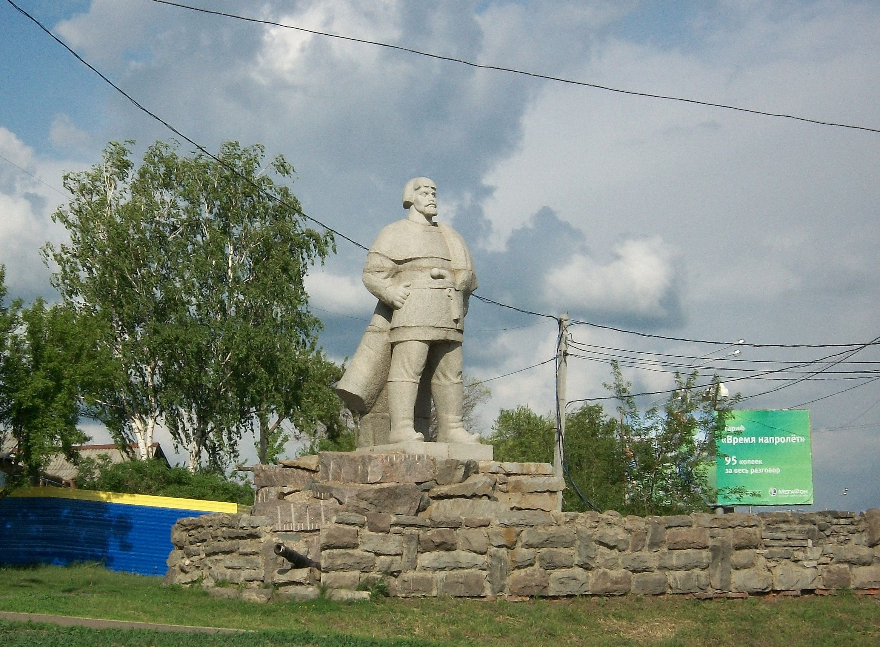 Памятник Емельяну Пугачёву в Саранске. Бастион: архитекторы В. И. Сологуб, С. Г. Нюхаев, Ф. П. Кильдюшкин. Фигура Пугачёва: скульпторы Г. Д. Гликман и А. Г. Плискин. В скульптурную композицию также входят памятный знак и обелиск с оружием повстанцев (отстутствуют на снимке)